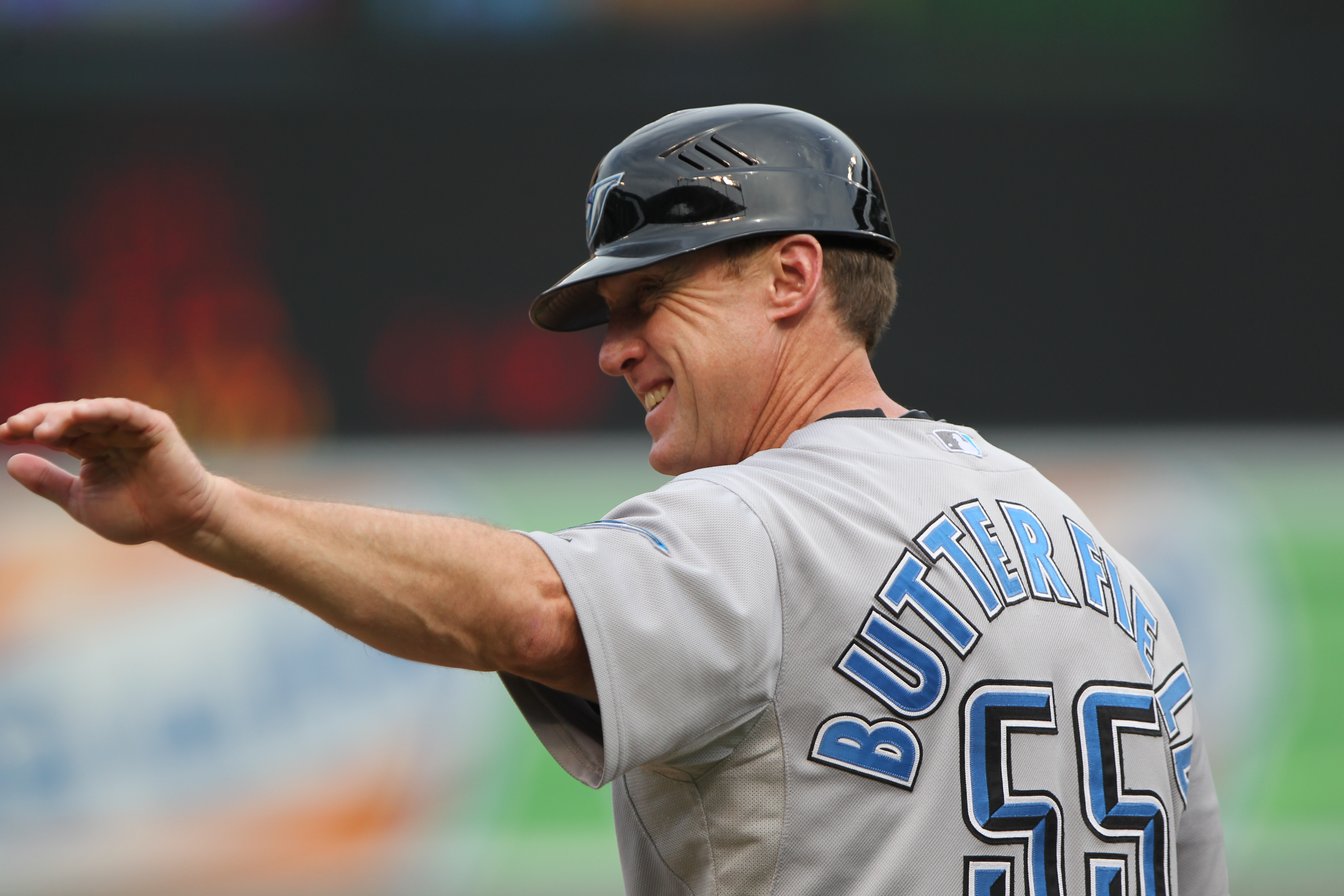 Brian Butterfield